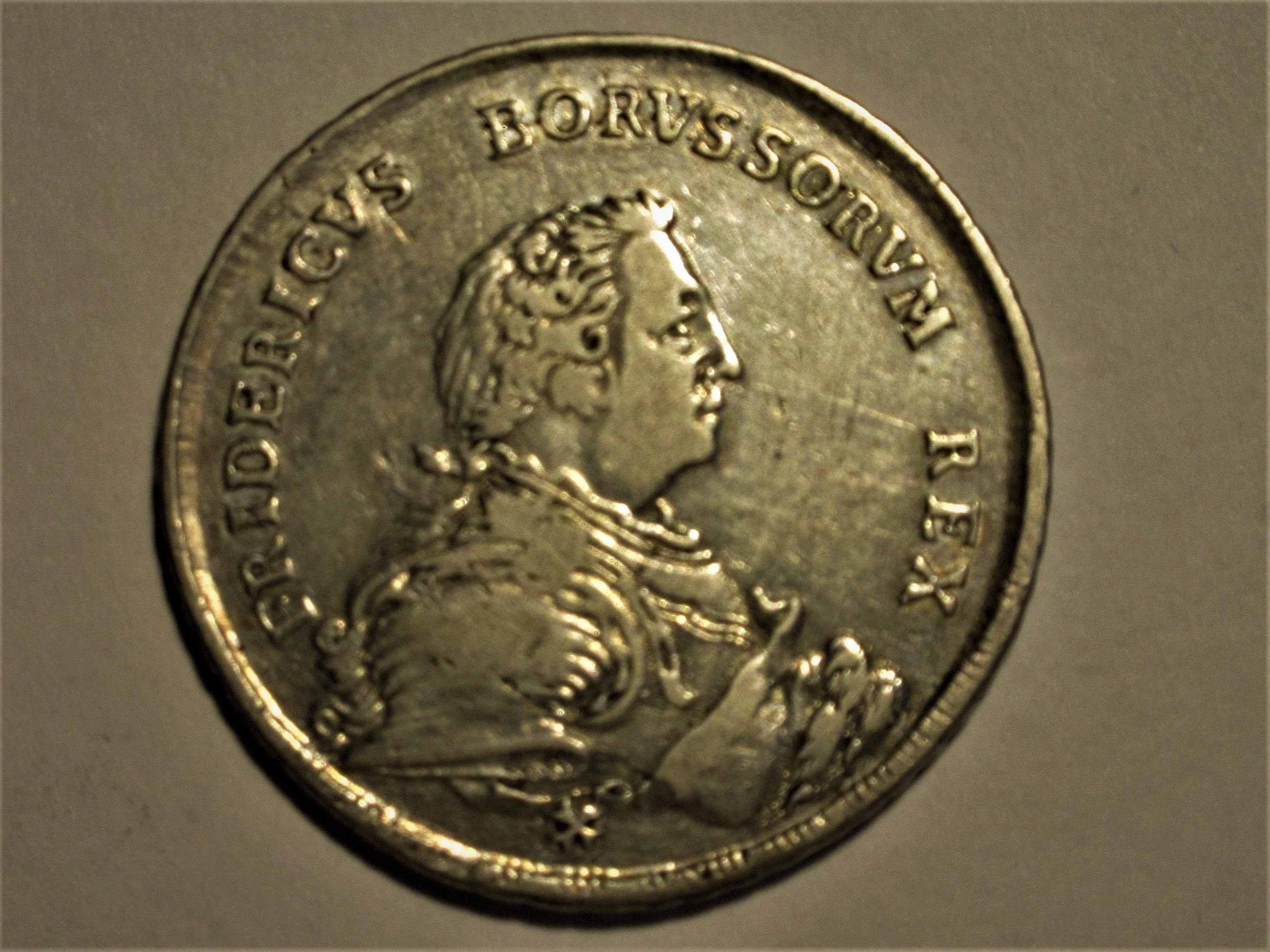 Preußischer Taler von 1750, Avers